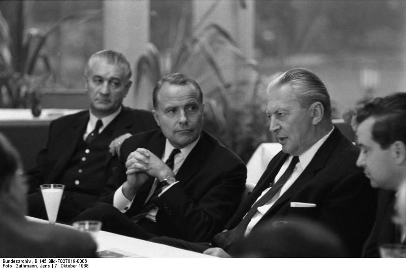 Bundeskanzler Kiesinger auf dem Kommunalkongress der CDU-CSU in Frankfurt/Main (Palmengarten)